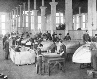 Es una foto de una fábrica de aviones de la República Argentina.